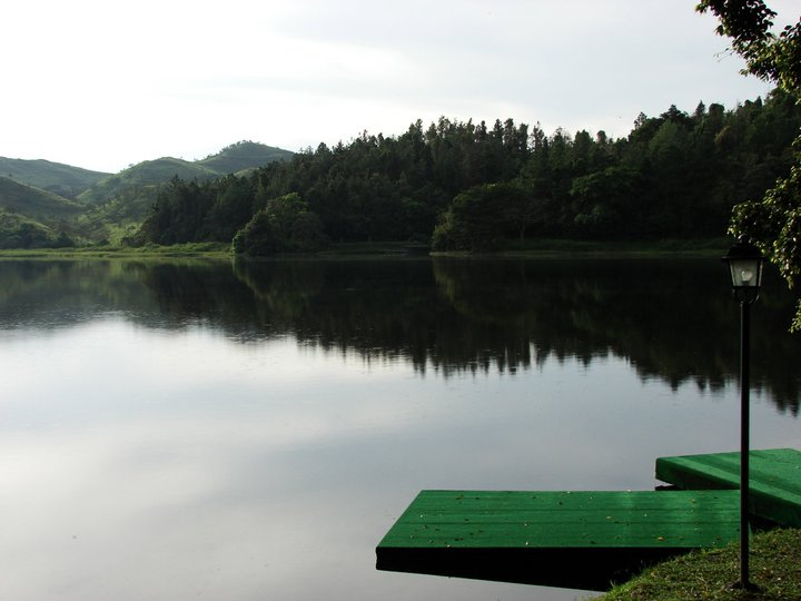 Campamento Lagunazo, Tinaquillo, Estado Cojedes, Venezuela